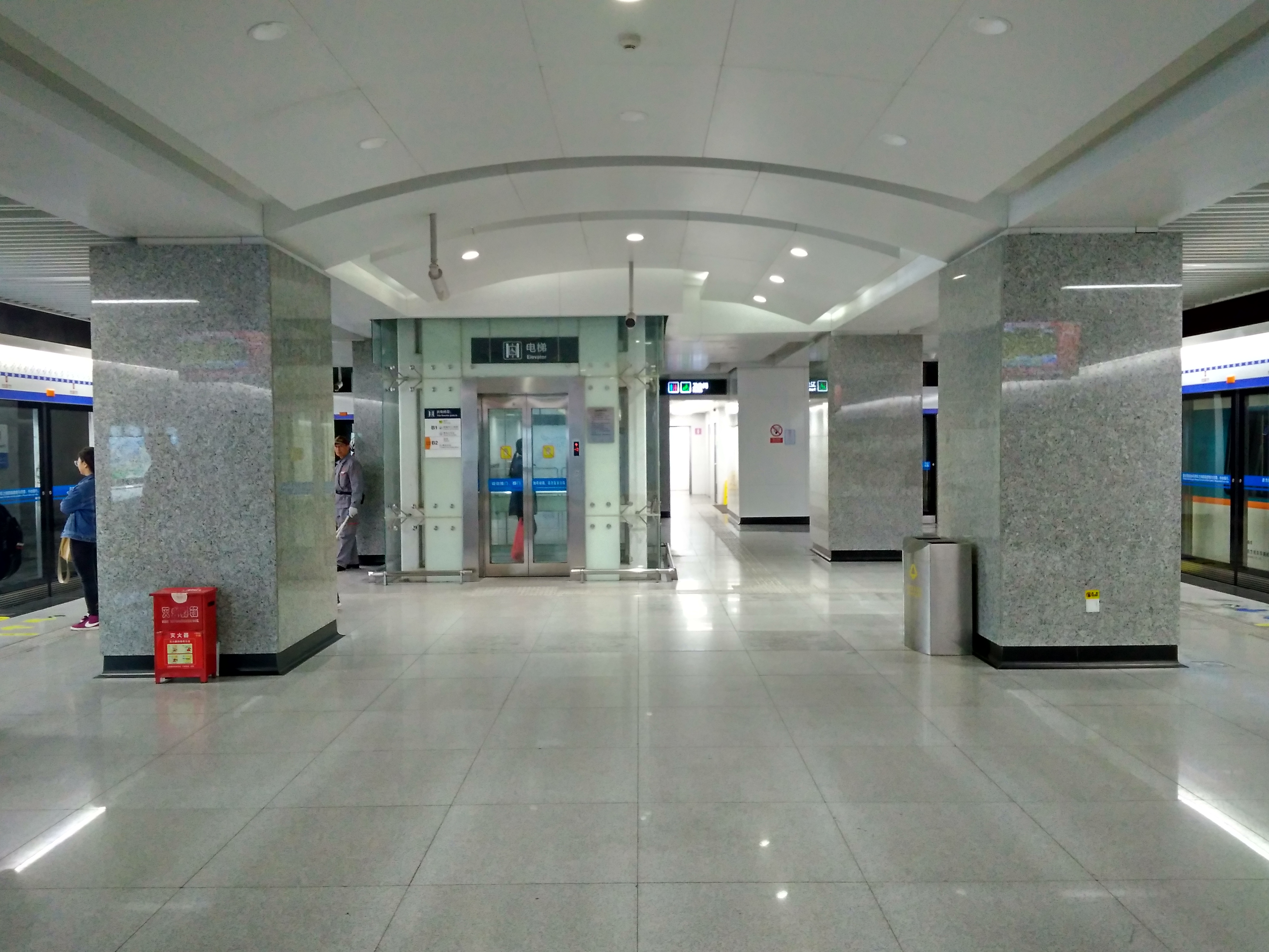 青岛站3号线站台